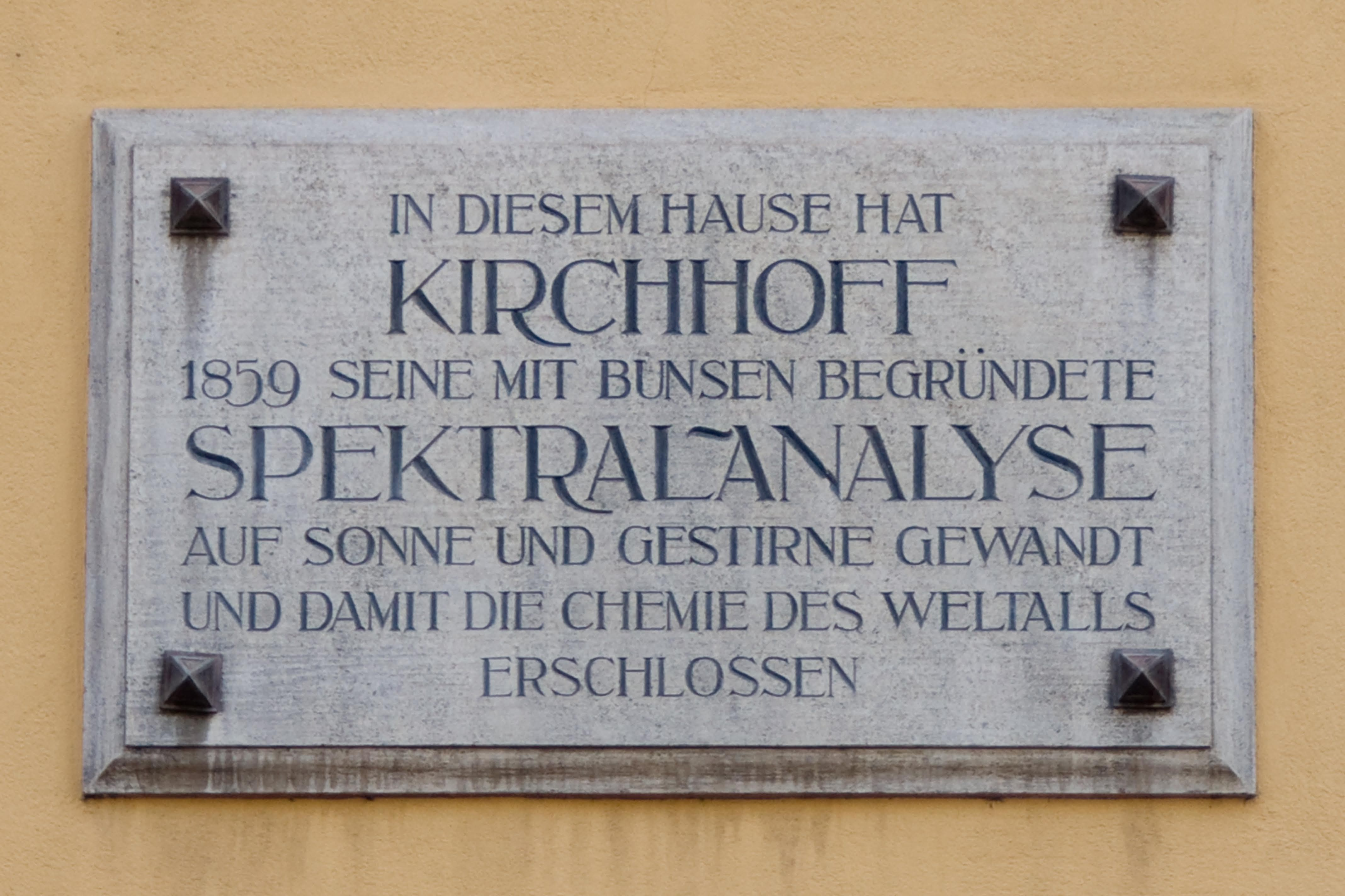 "In diesem Haus hat Kirchhoff 1859 seine mit Bunsen begründete Spektralanalyse auf Sonne und Gestirne gewandt und damit die Chemie des Weltalls erschlossen"